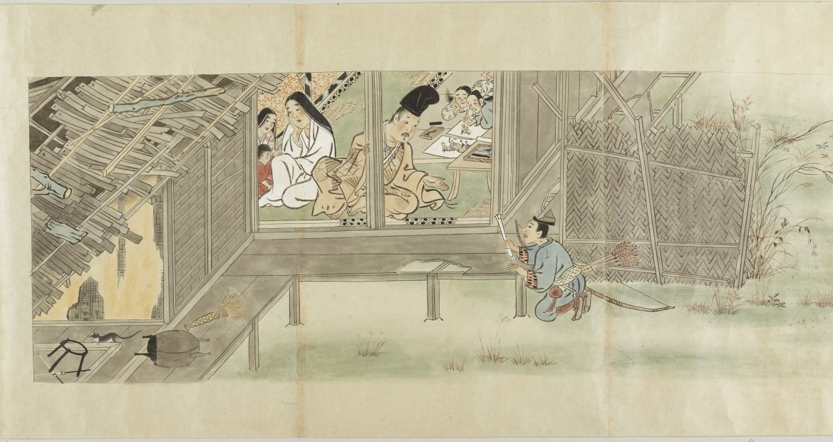 Copie de l'emaki de l'Histoire d'un peintre. Détail de la deuxième peinture.